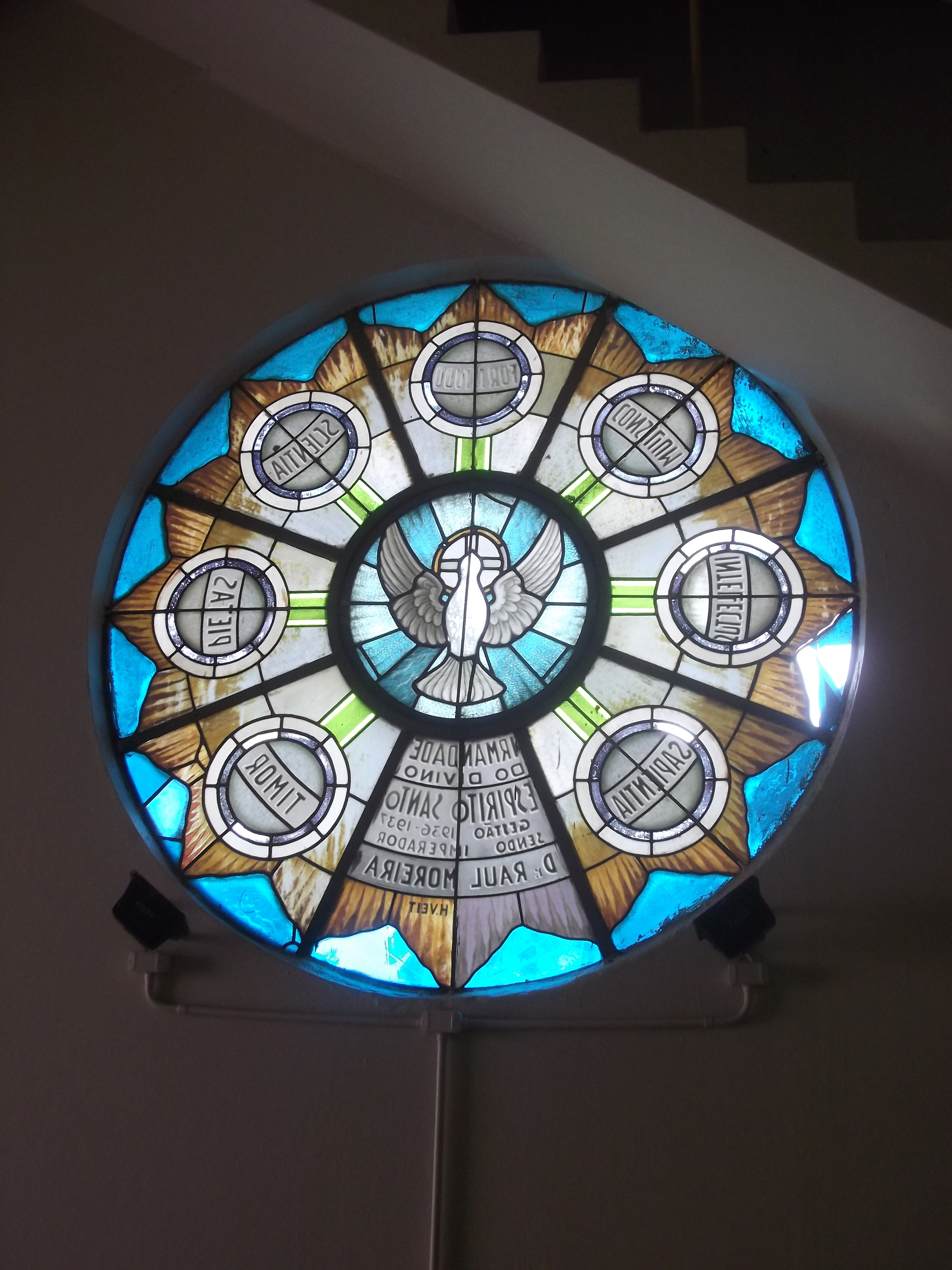 Capela do Divino Espírito Santo em Porto Alegre